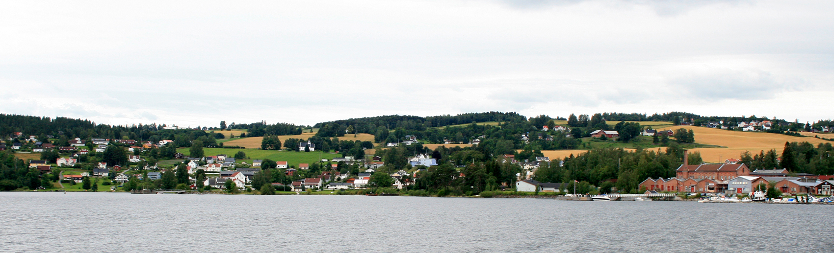 Kapp, Østre Toten, Norway.